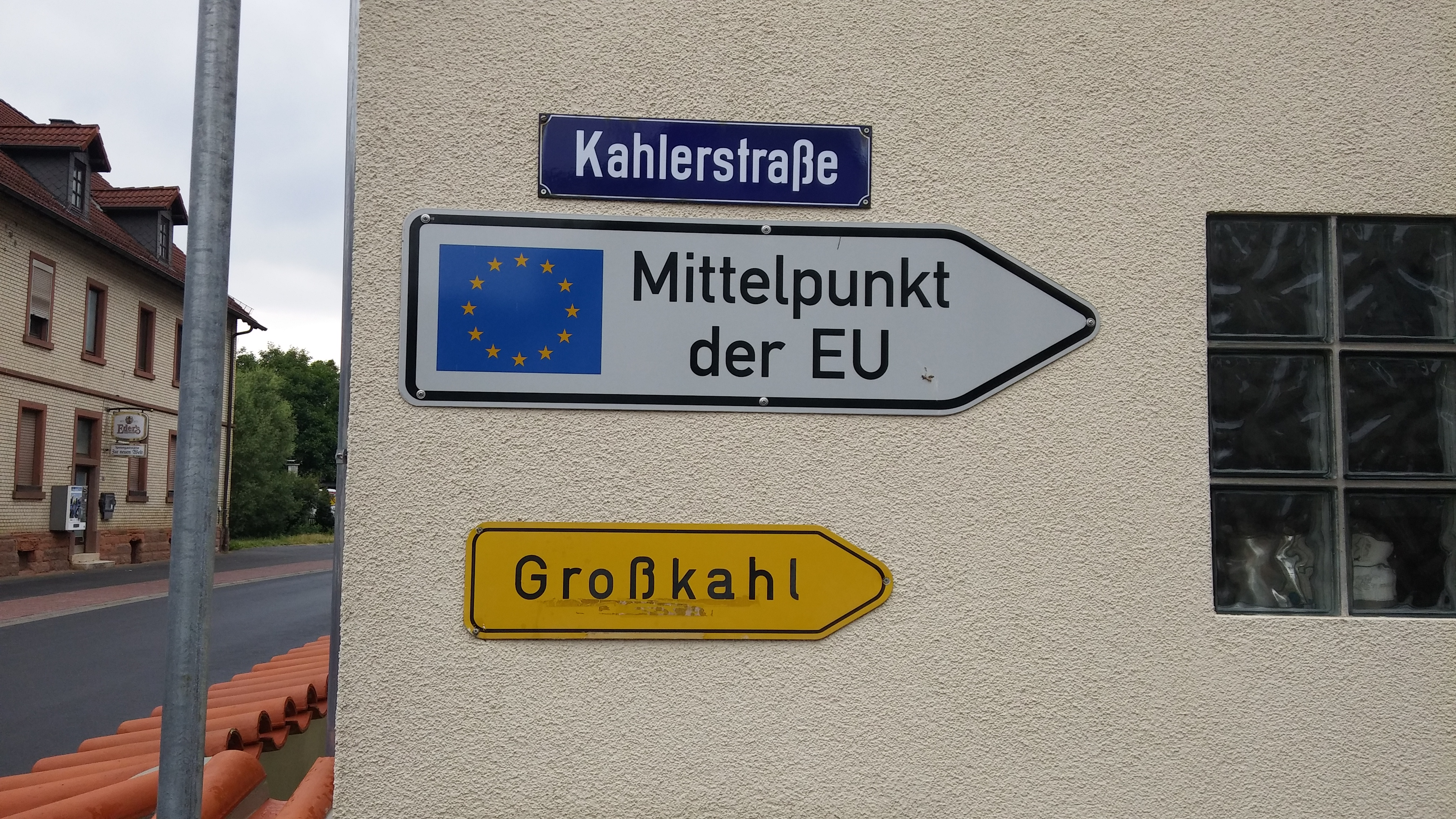 Hinweisschild auf den Europäischen Mittelpunkt in Oberwestern